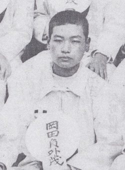 岡田貞外茂海軍大佐